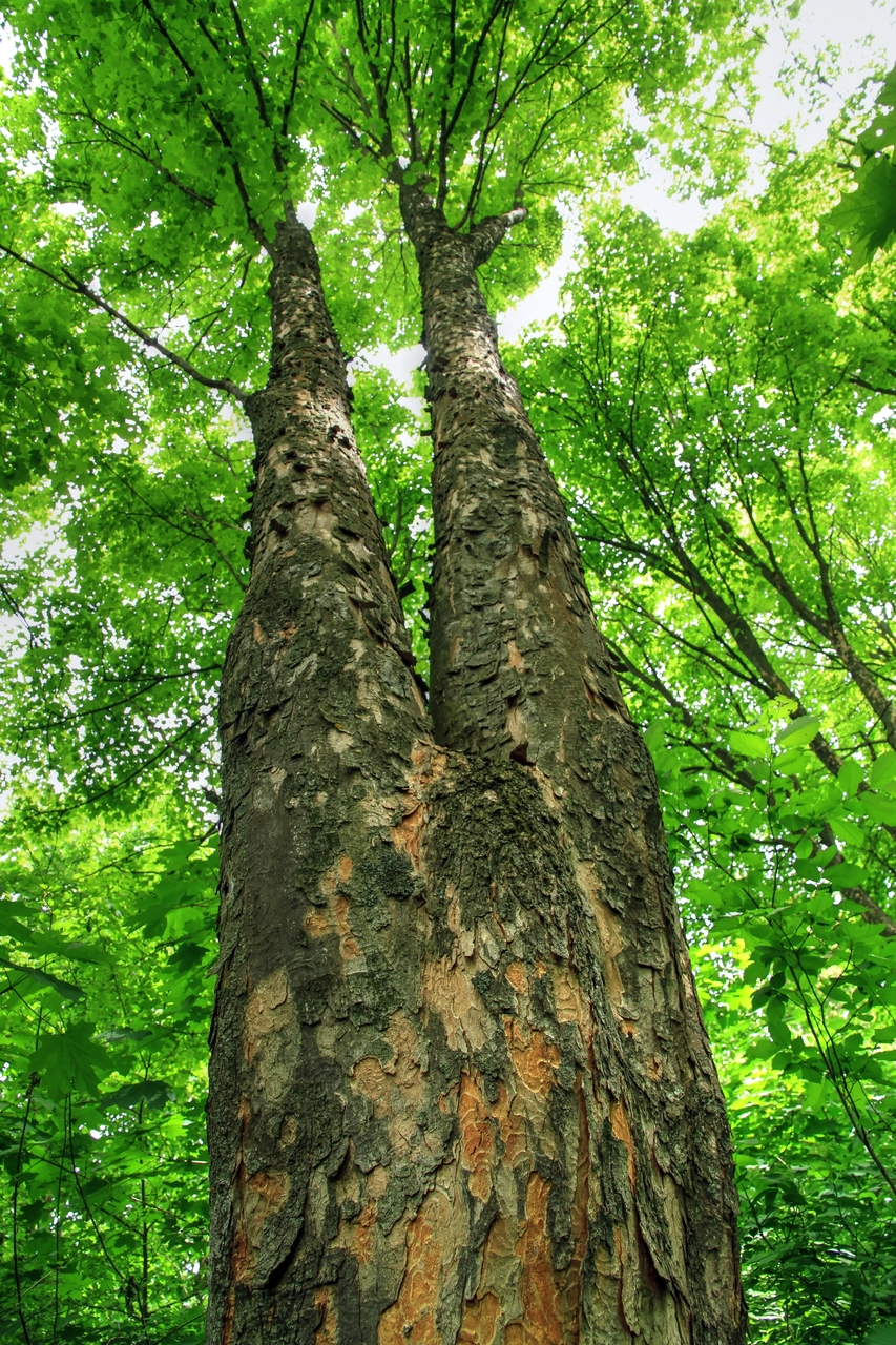 Павловский парк, монумент природы, находится в Бриченский район, с. Павловка (код MD-BR-map-002)